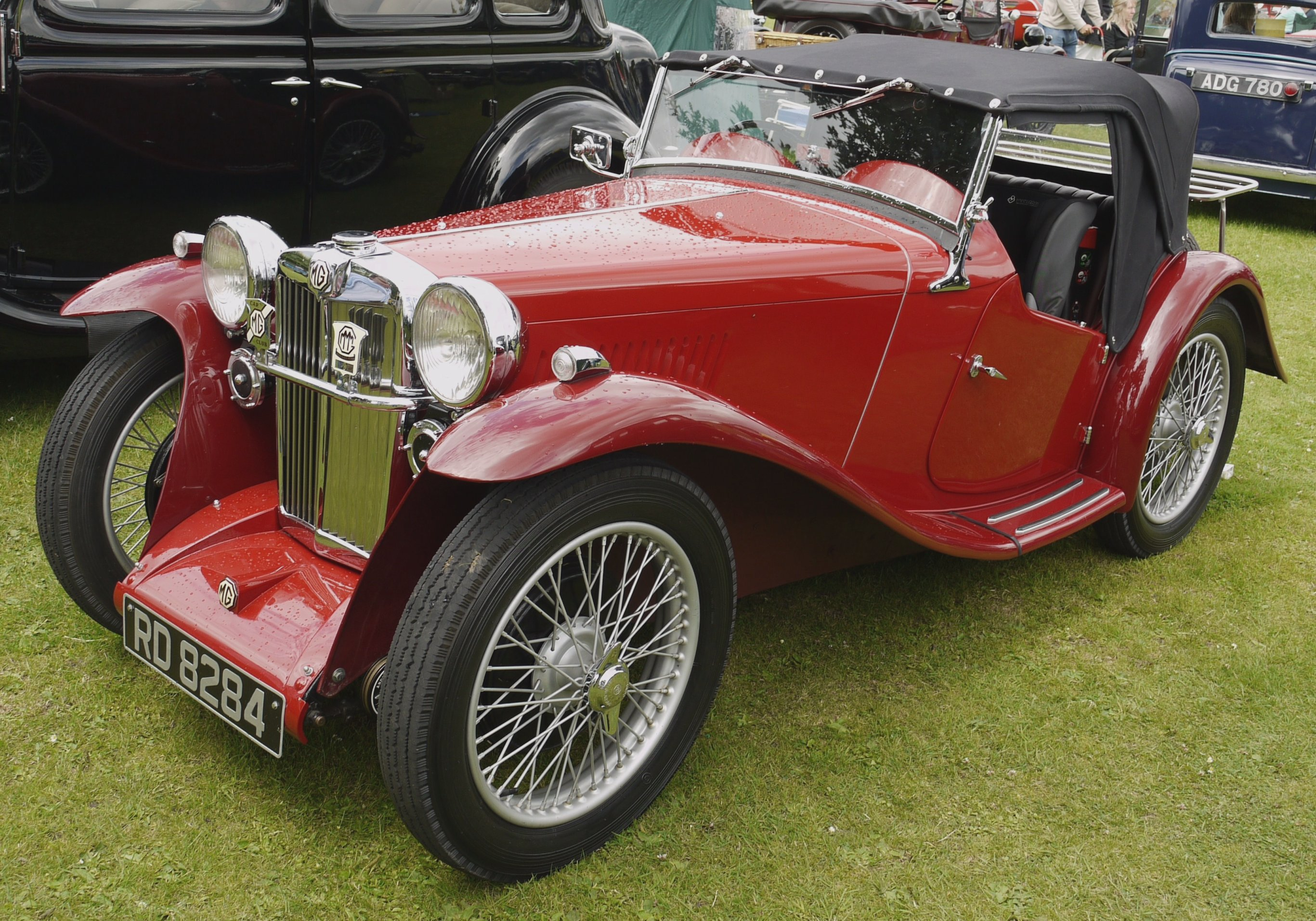 Panasonic G1 14-45 Lens